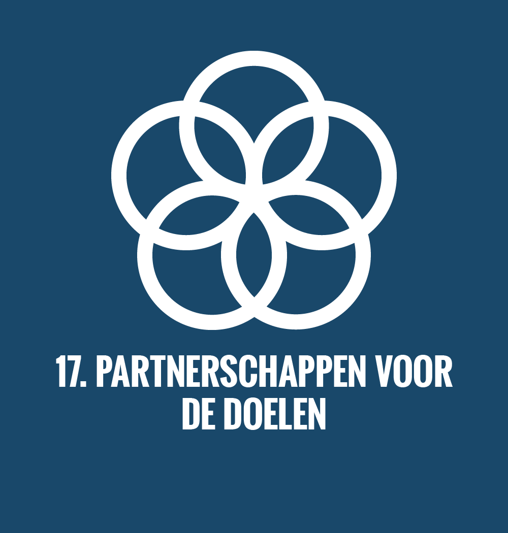 Duurzame ontwikkelingsdoel SDGRomână: Obiectivul de dezvoltare durabilă nr. 17: Parteneriat pentru dezvoltare durabilă (în neerlandeză)